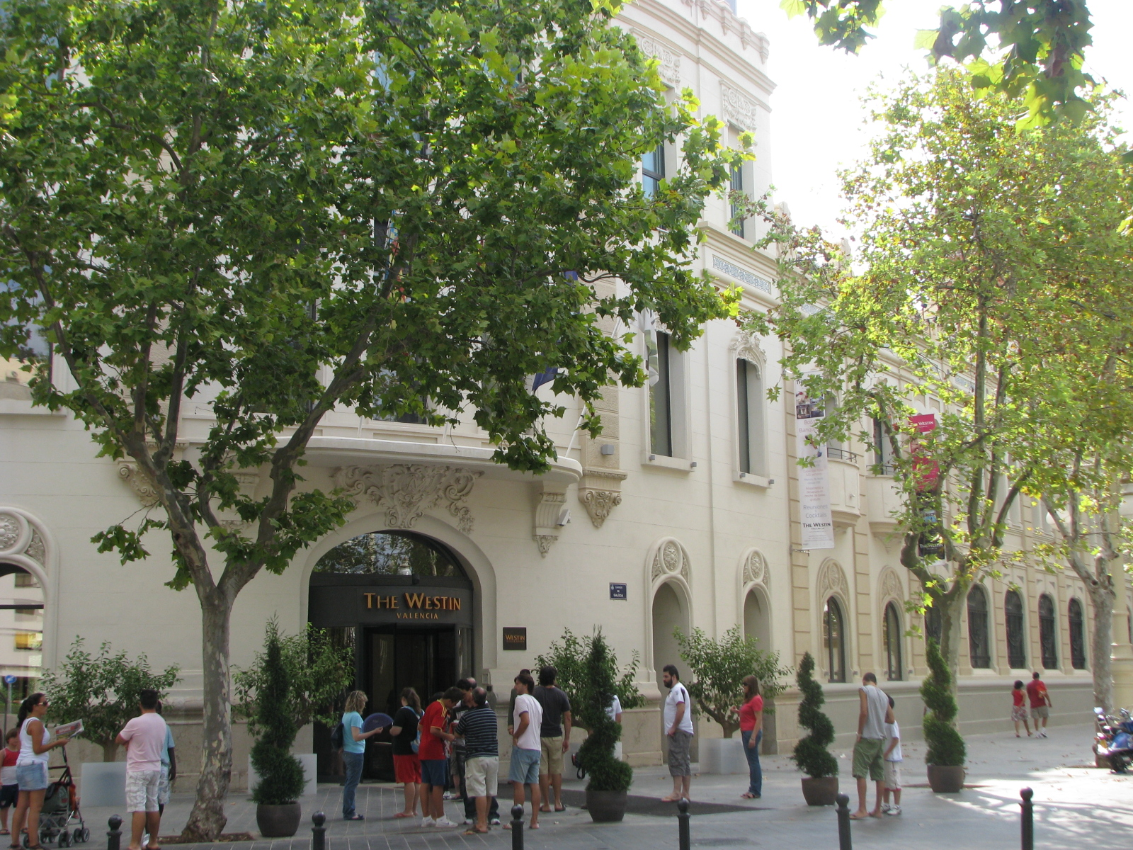 Acceso principal al Hotel Westin Valencia (España).